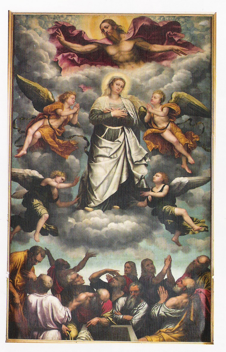 Olio su tela, 450 × 272 cm, Chiesa di Santa Maria Assunta di Maguzzano Lonato del Garda Brescia Italia.